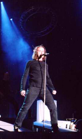 Hansi Kürsch am BG-OA in Coburg Fotograf oder Zeichner: Benutzer:Gardini Datum: de:13. Juni de:2003